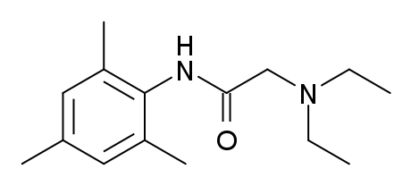 Trimecaine structure